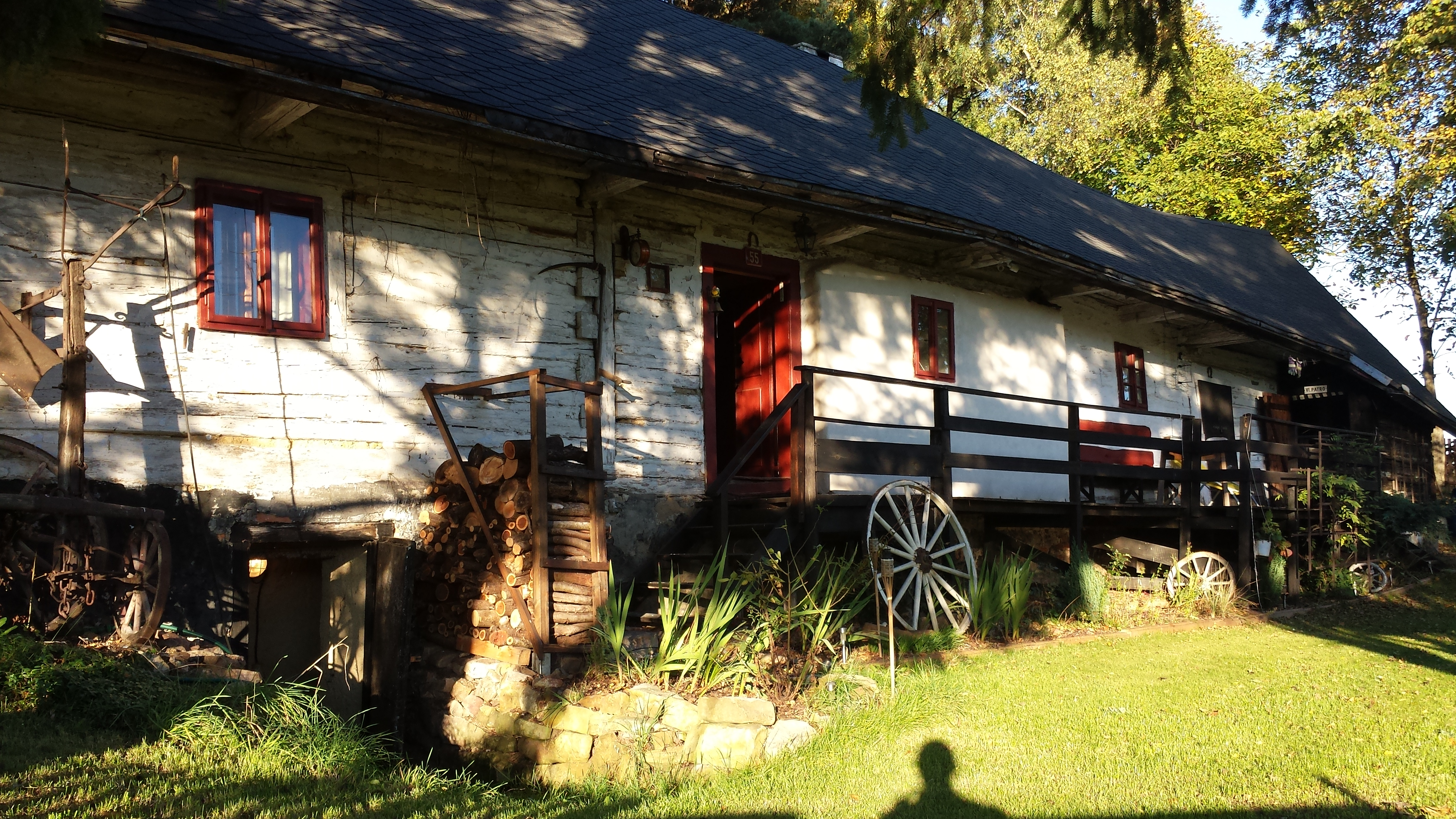 Roubená usedlost z roku 1797, od 60 let zapsaná do seznamu národních kulturních nemovitých památek, bydliště známého pražského architekta Ak. arch. Vladímíra Uhlíře